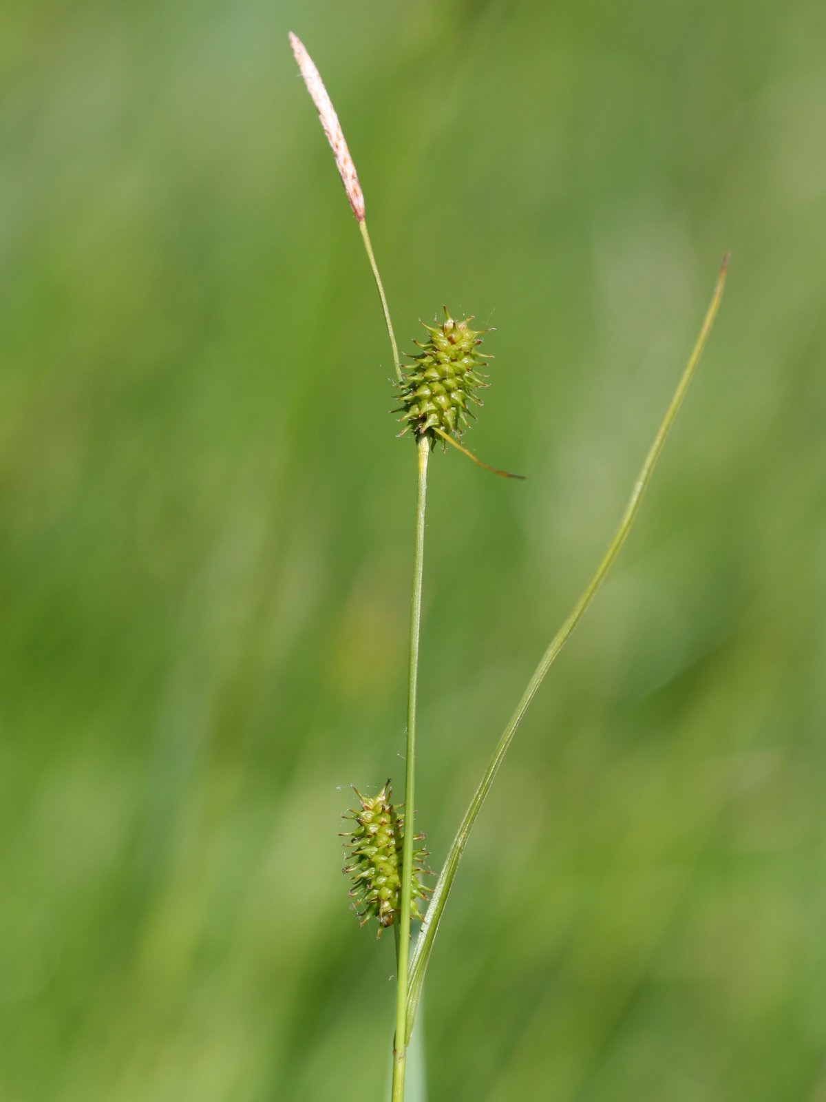 Schuppenfrüchtige Gelb-Segge (Carex lepidocarpa)